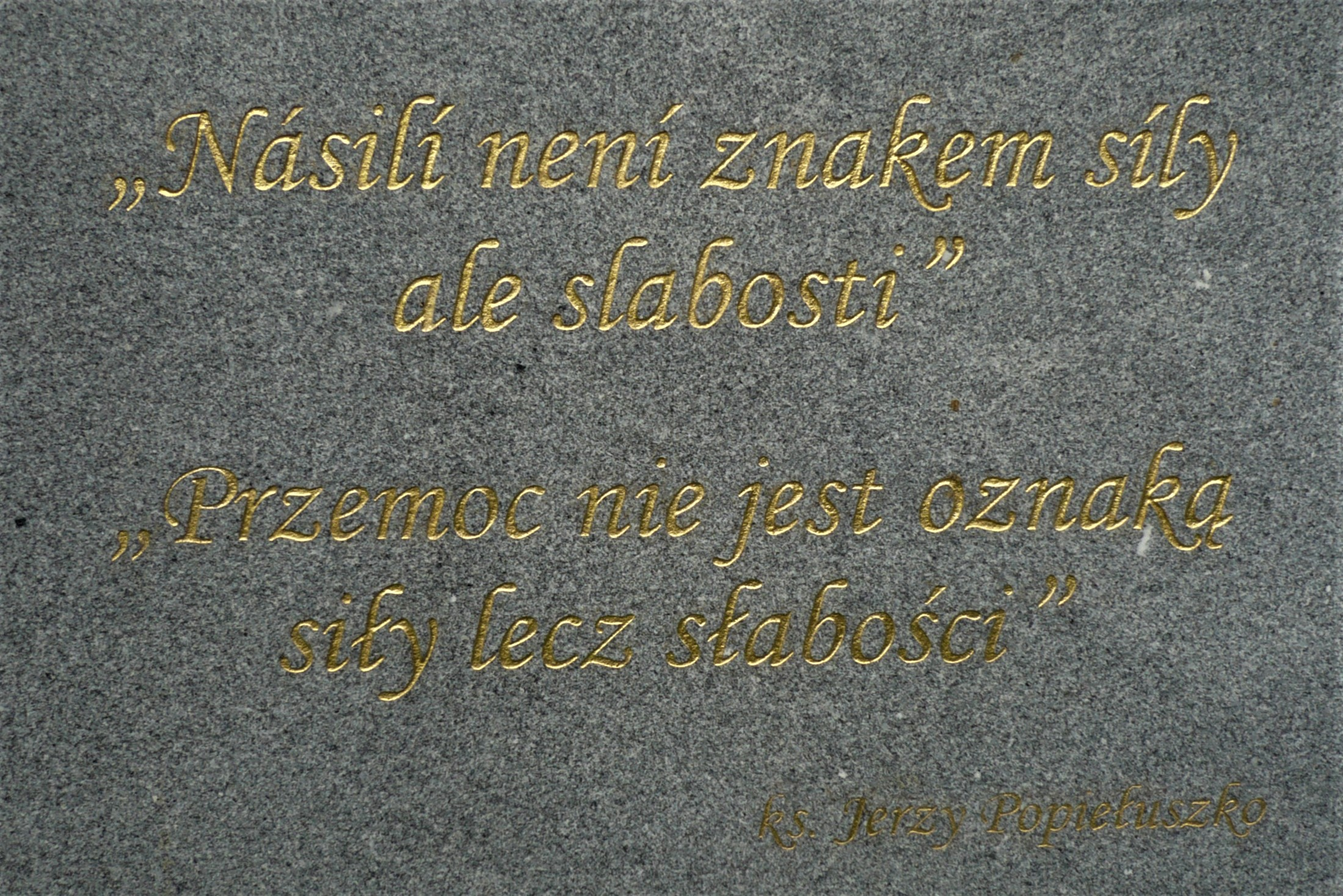 Borówkowa. Tablica